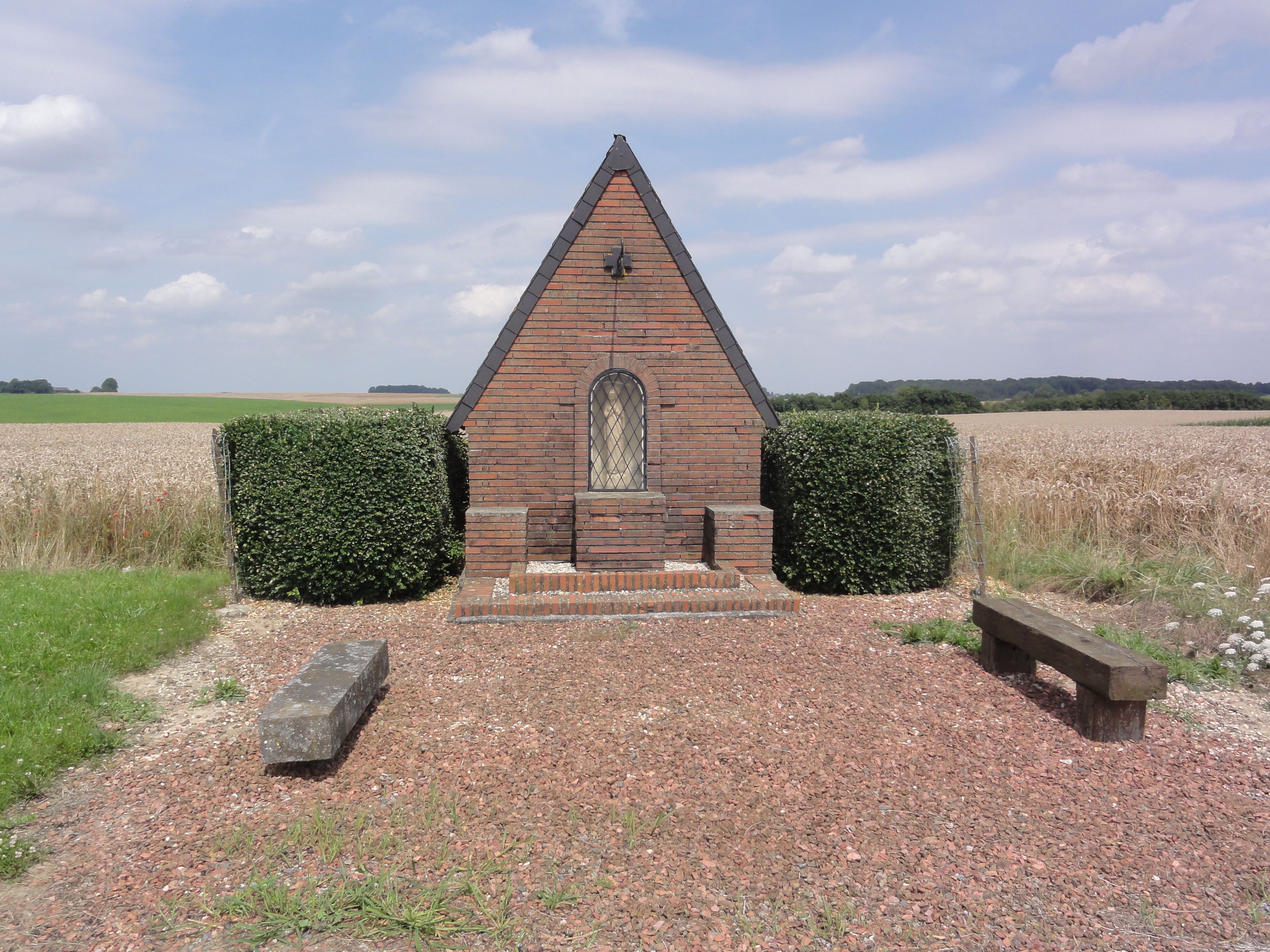 Aubencheul-aux-Bois (Aisne) oratoire